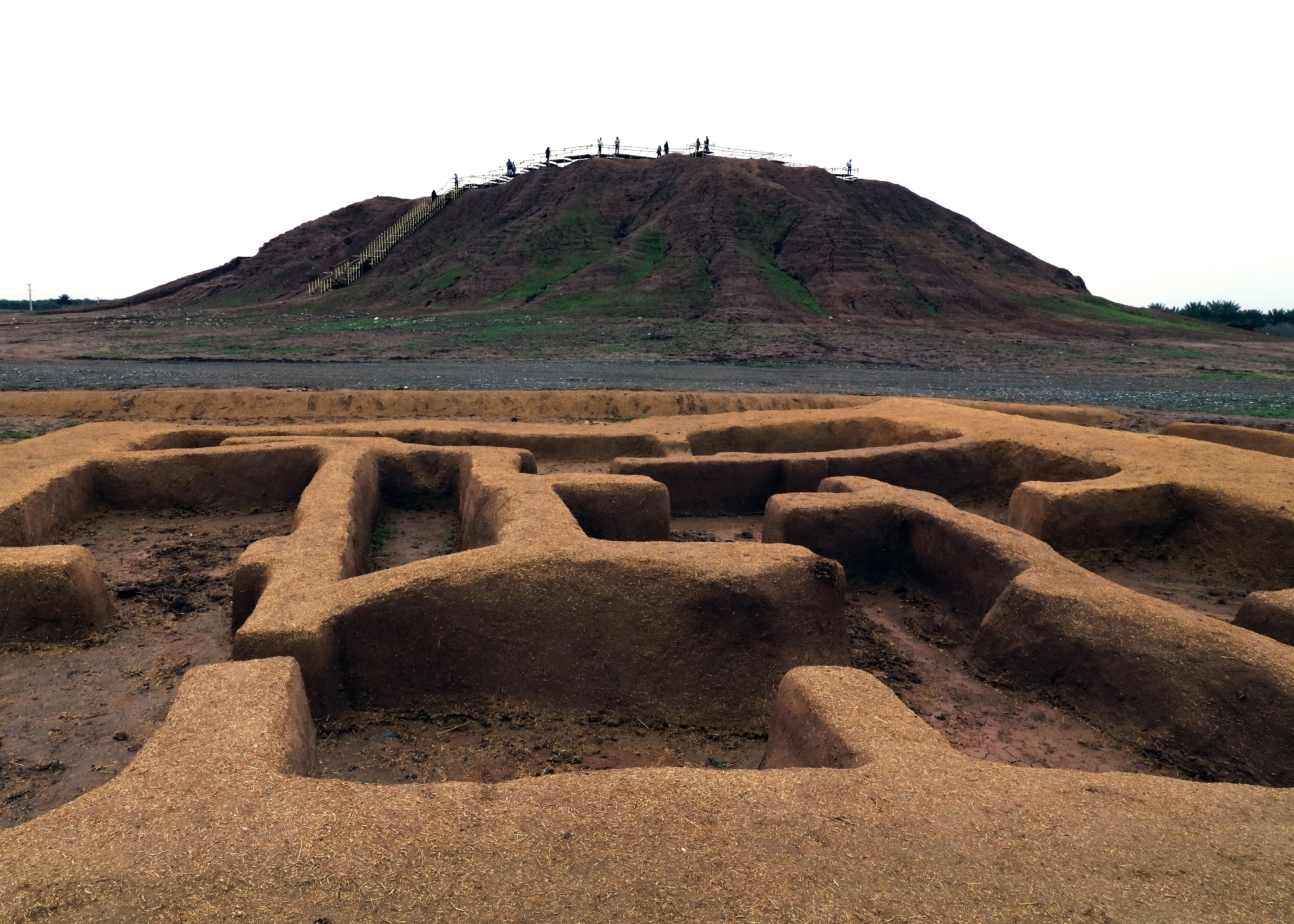 تم کنار صندل الف (تپه کنار صندل الف)